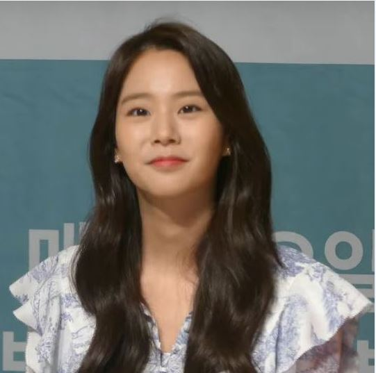 17일 오후 서울시 서초구 서초동 흰물결아트센터에서 TV조선 신개념 여행 예능프로그램 '일단 같이 가!' 제작발표회가 열려 토니안, 한승연, 아스트로 진진, MJ, 김소혜가 참석해 포토타임을 갖고 있다.